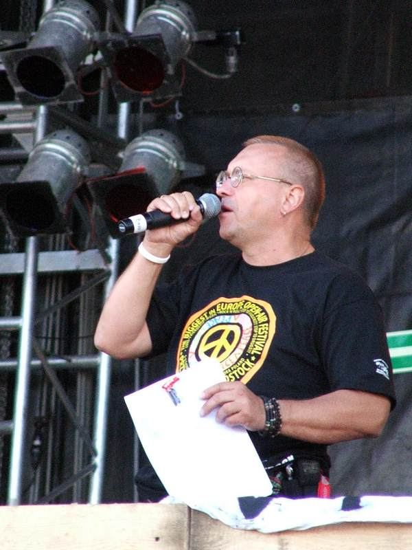 Jerzy Owsiak (Przystanek Woodstock, Kostrzyn 2005)